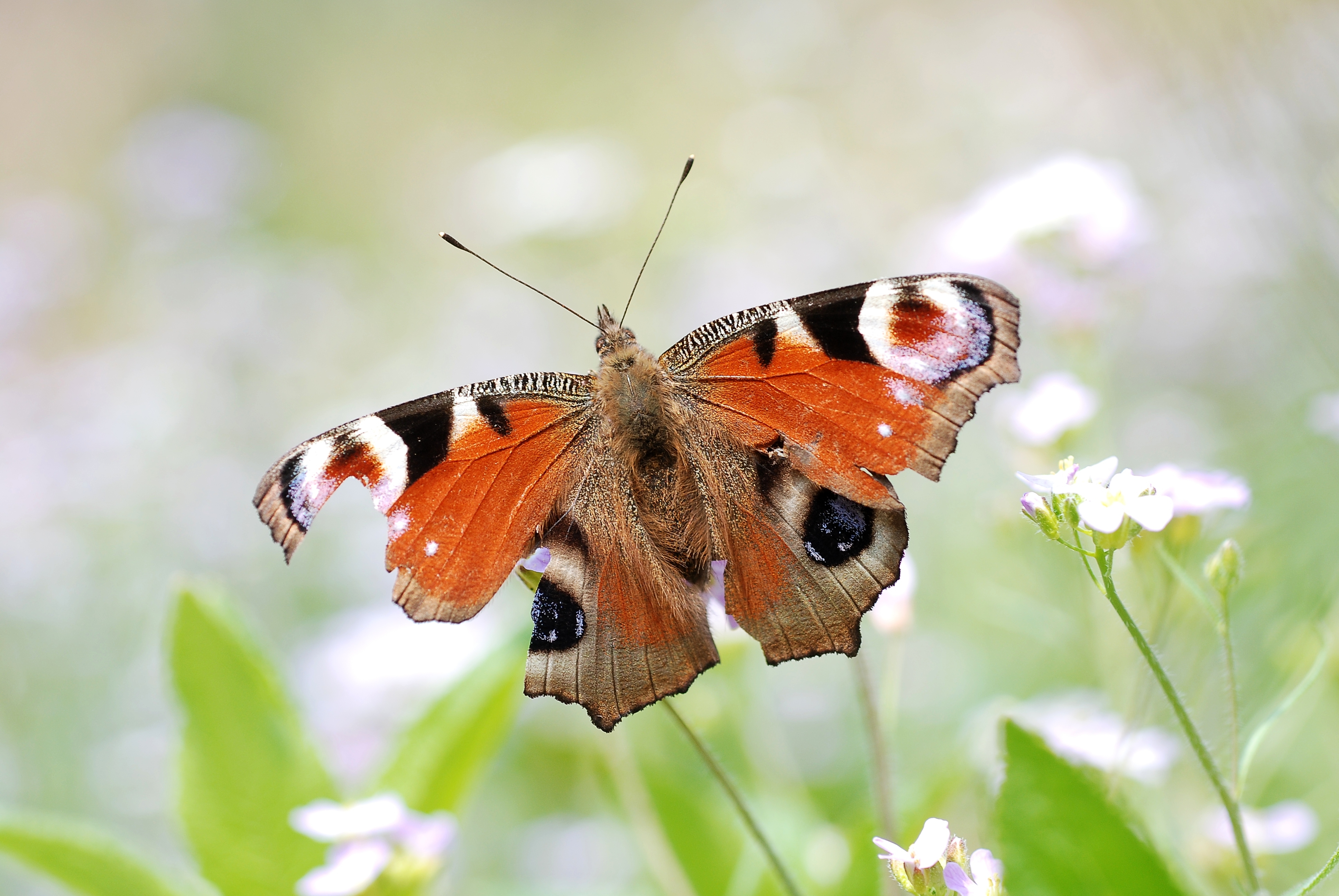 Inachis io